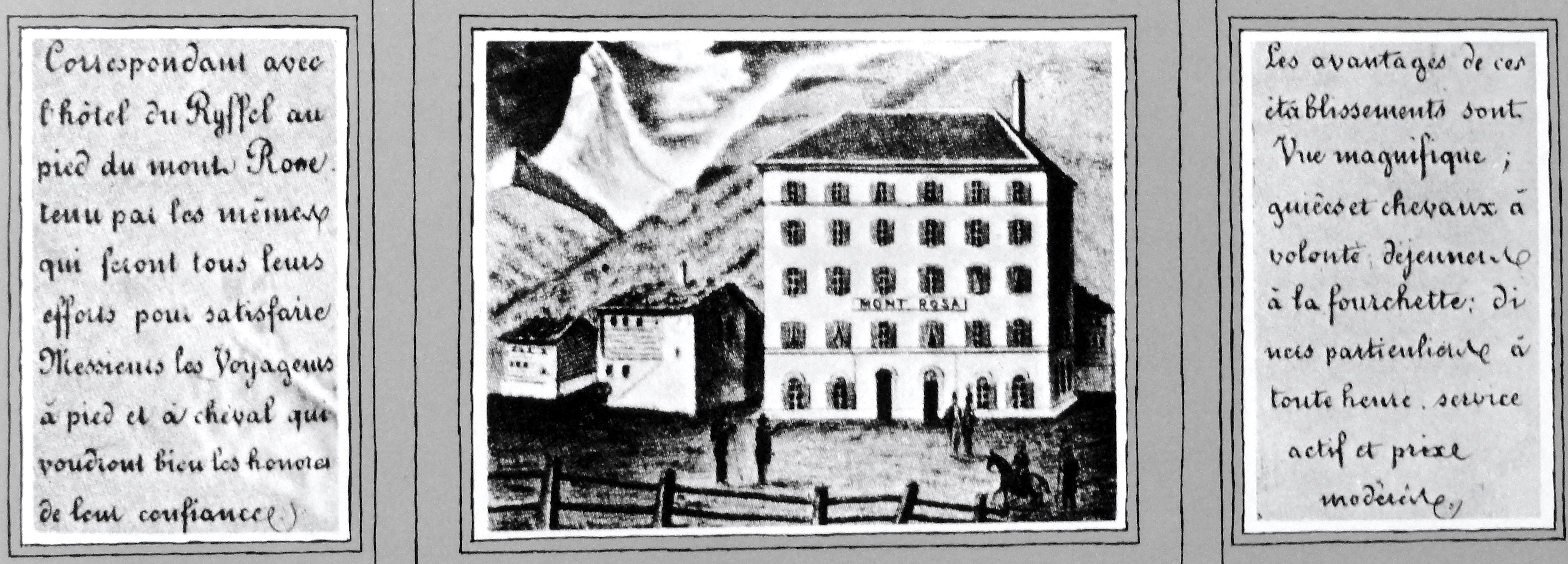 Prospekt des Hotel Monte Rosa, um 1860